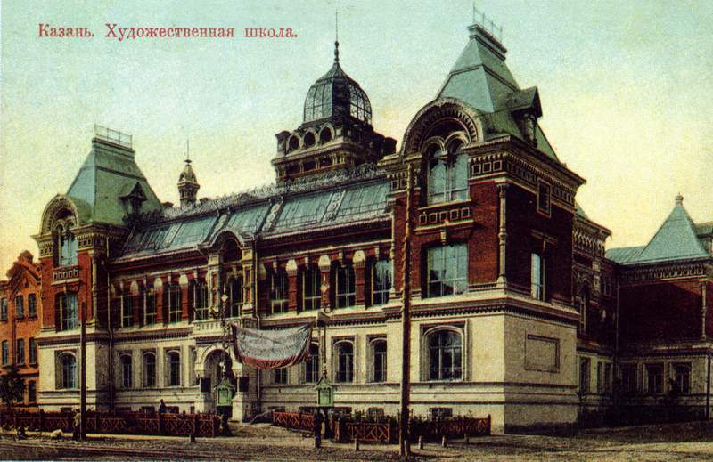 Казань. Художественная школа.